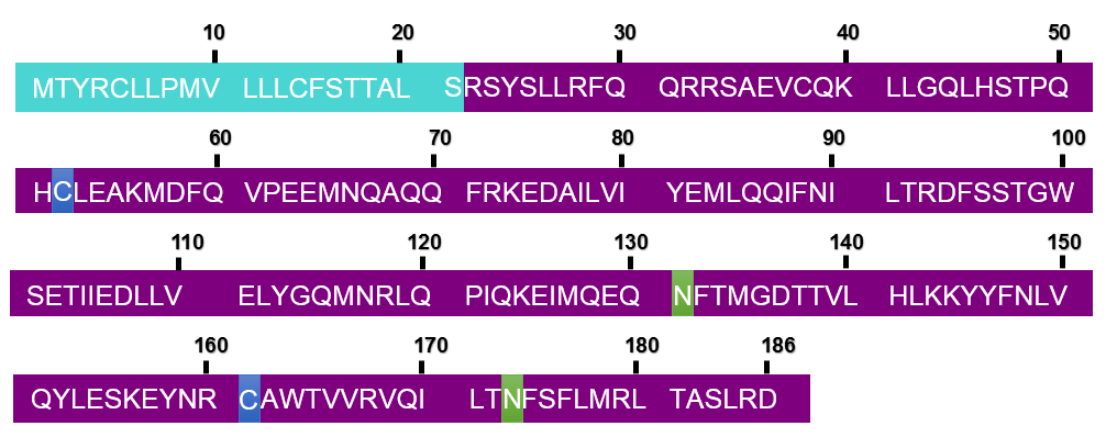 Seqüencia dels 186 aminoàcids (númerats en grups de 10) que configuren la cadena peptídica de l'interferó.